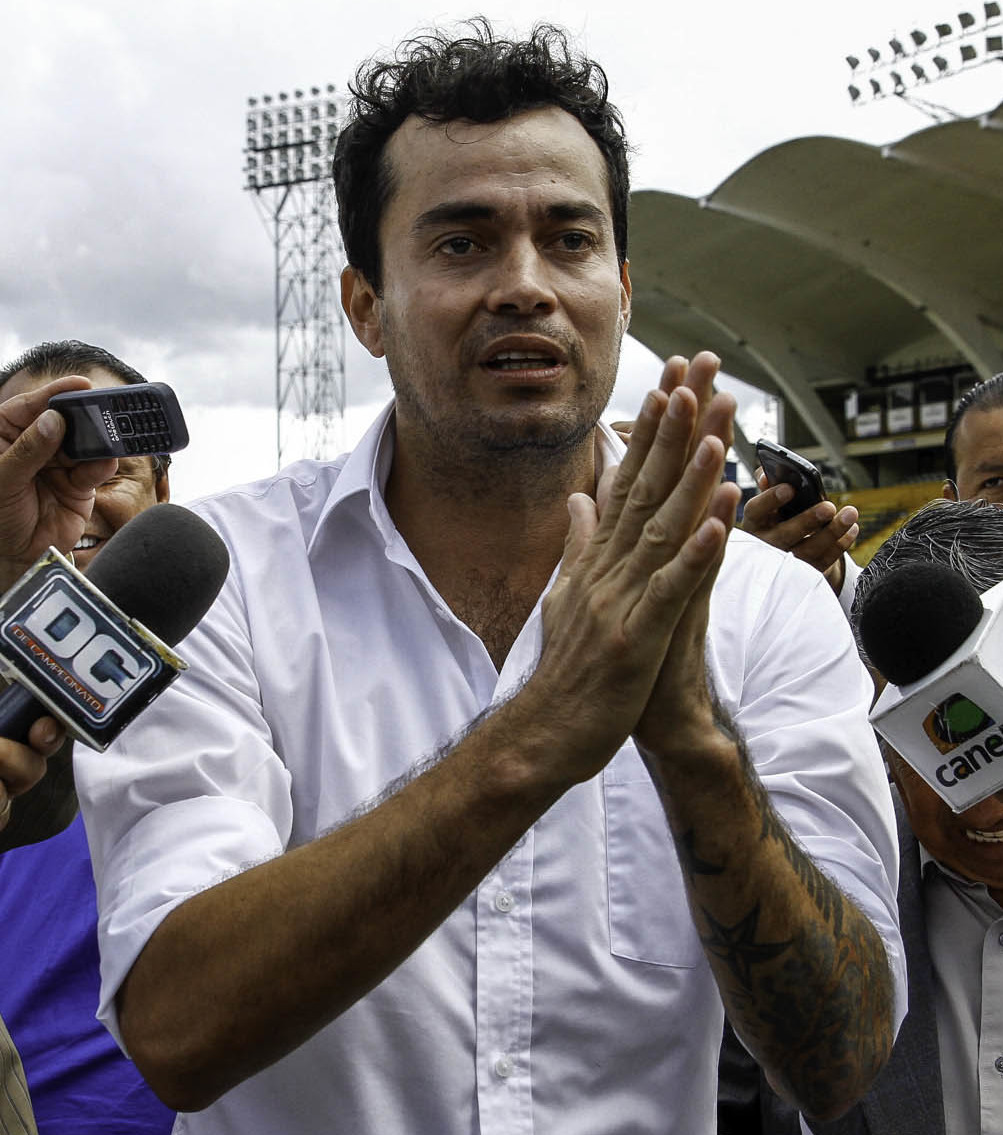 Quito, 5 may (ANDES).- En un acto simbólico Jaime Iván Kaviedes recibió el arco sur en el cual anotó el gol que llevó a la Tri a su primer mundial de fútbol Japón 2002. Foto: Micaela Ayala V./ANDES